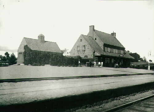 Vagnhärads järnvägsstation hade sin glanstid under Gustaf V tid. Där han bland annat tog emot många kungliga gäster på besök, vid Tullgarns slott, där kungliga familjen vistades på somrarna